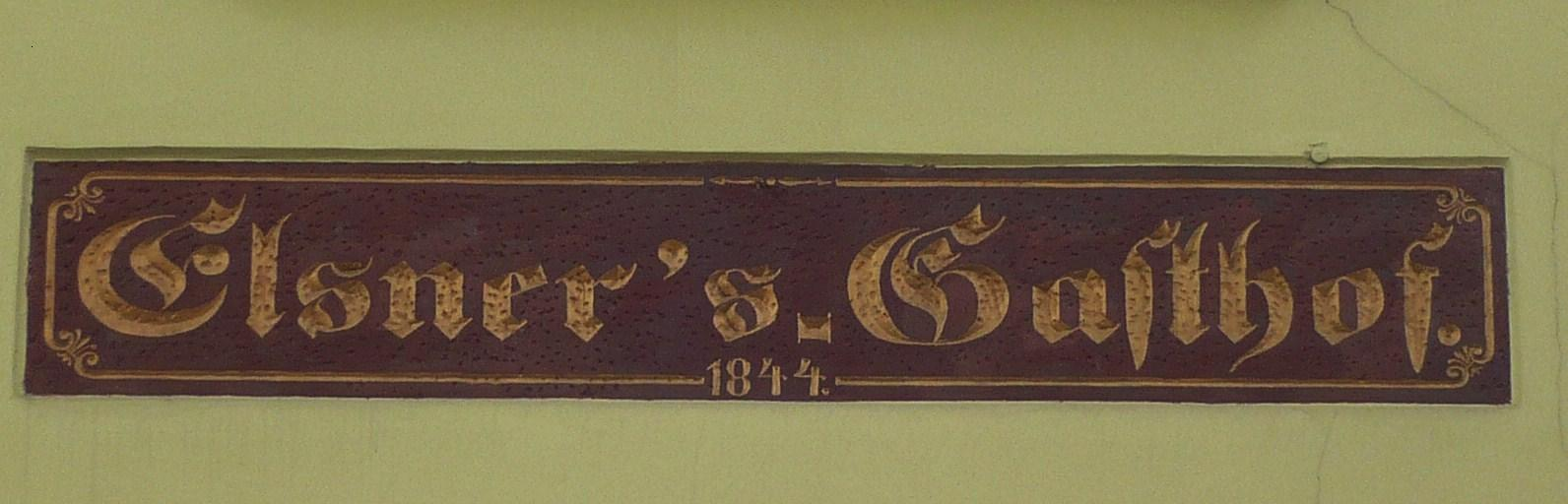 Nowa Ruda, ul. Niepodległości 17 - rządcówka, 1860